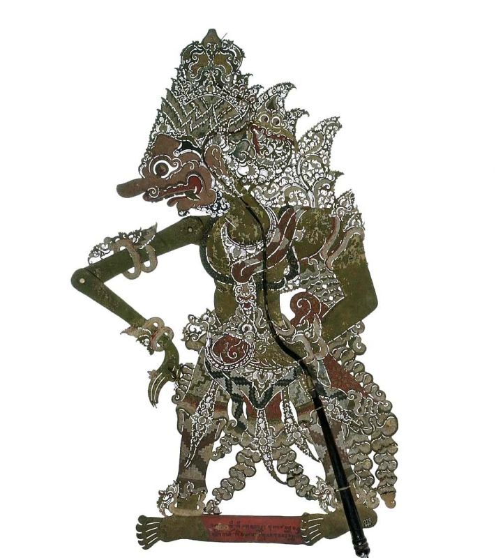 Wajangfiguur. Wajangfiguur van karbouwenhuid, Dasamuka voorstellend Unknown language: wayang purwa